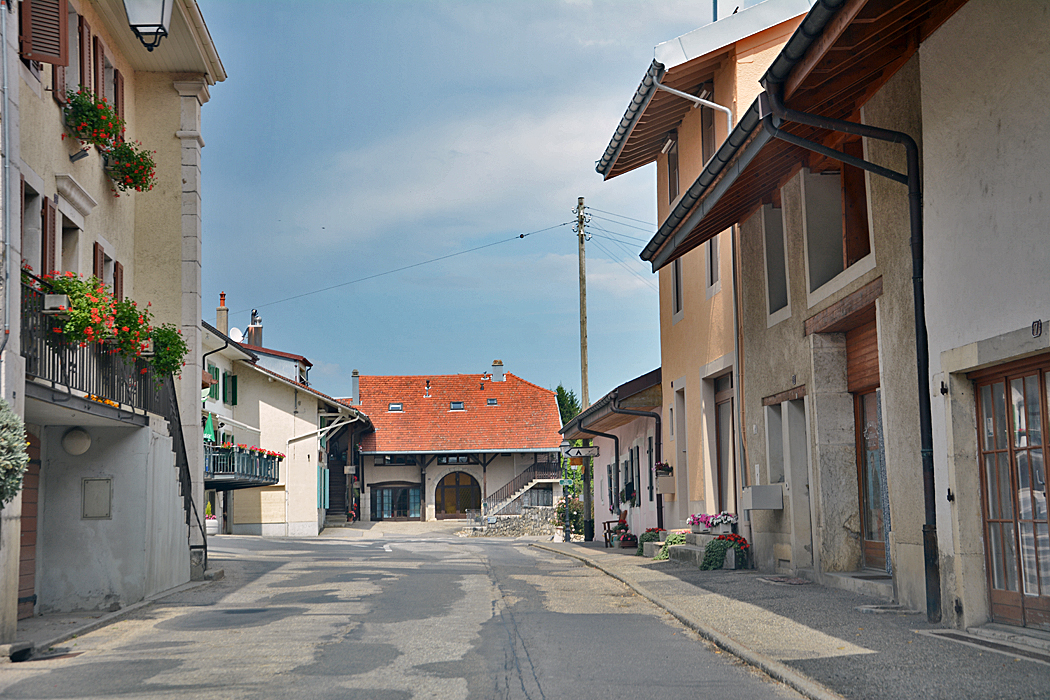 Le Vaud, Dorfzentrum